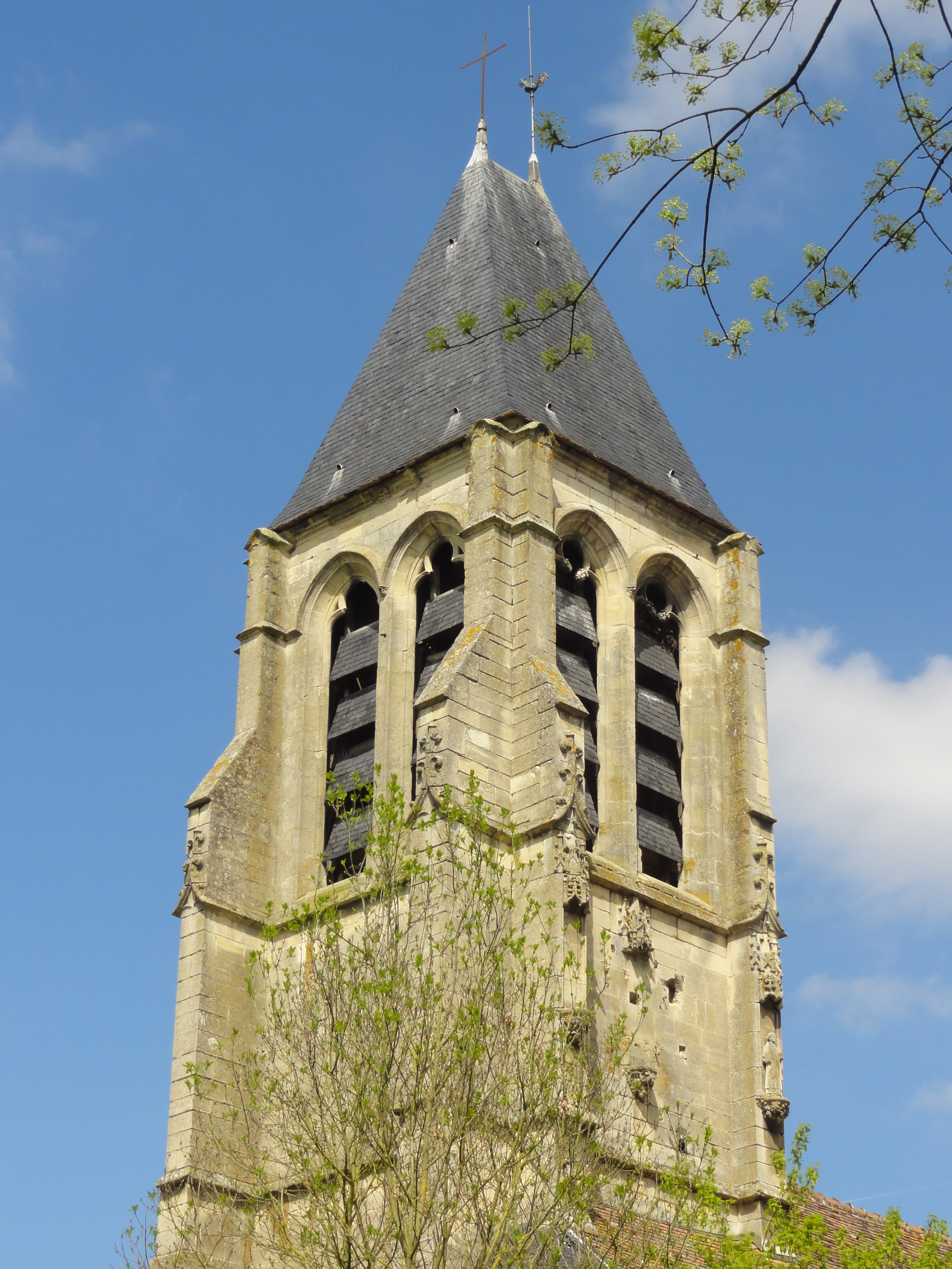 Église Saint-Denis de Méry-sur-Oise - voir titre.